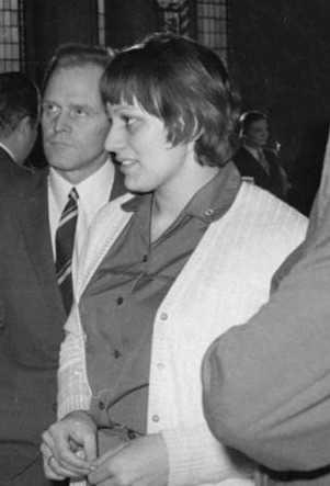 File:Bundesarchiv Bild 183-M0216-0316, Vorbereitung X. Festivalkomitee.jpg